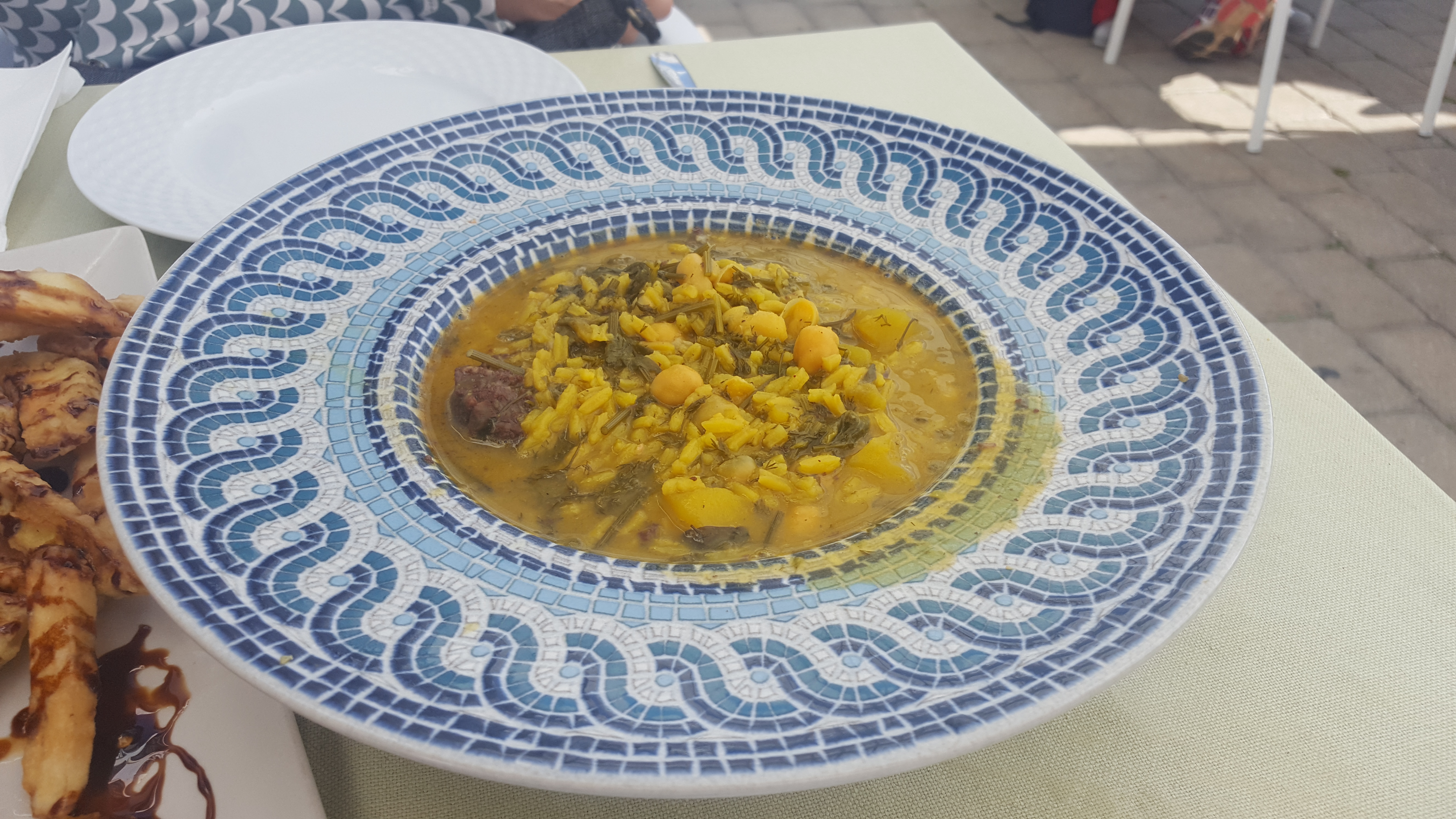 Puchero de hinojos, en Frigiliana, plato típico de la provincia de Málaga y Granada, España.